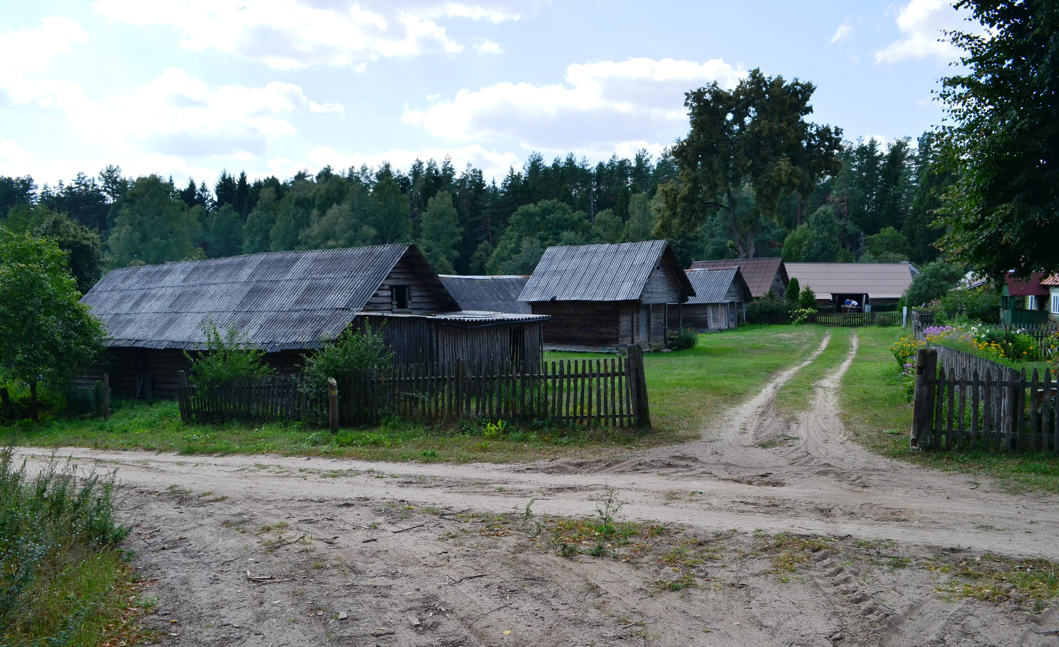 Tradicinė dzūkų sodyba. Zervynos, Dzūkijos NP, Varėnos raj.